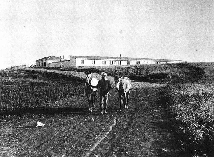 חוות פוריה בשנת 1912